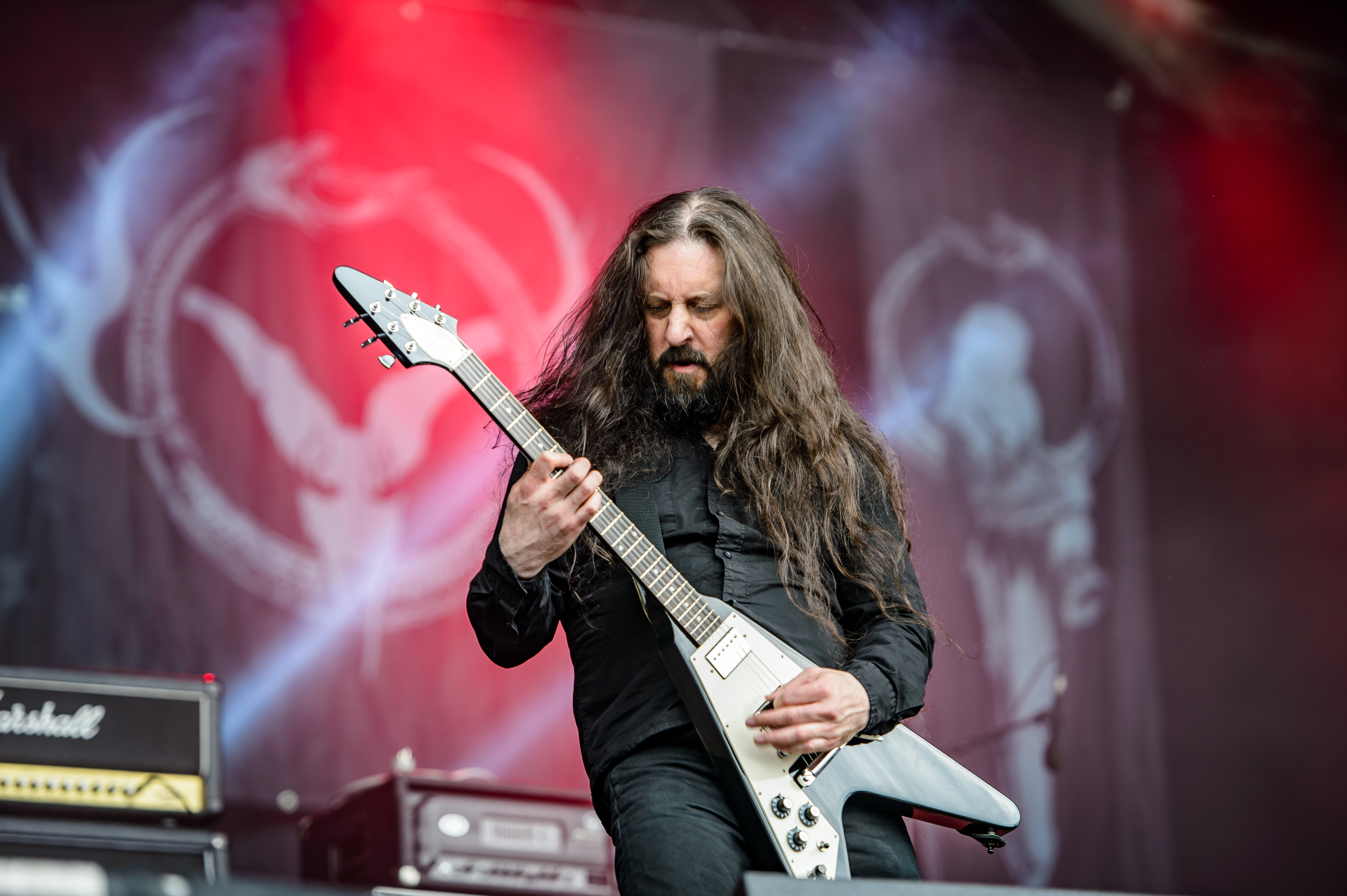 'RockHarz Open Air 2016; Ballenstedt': 'Primordial'